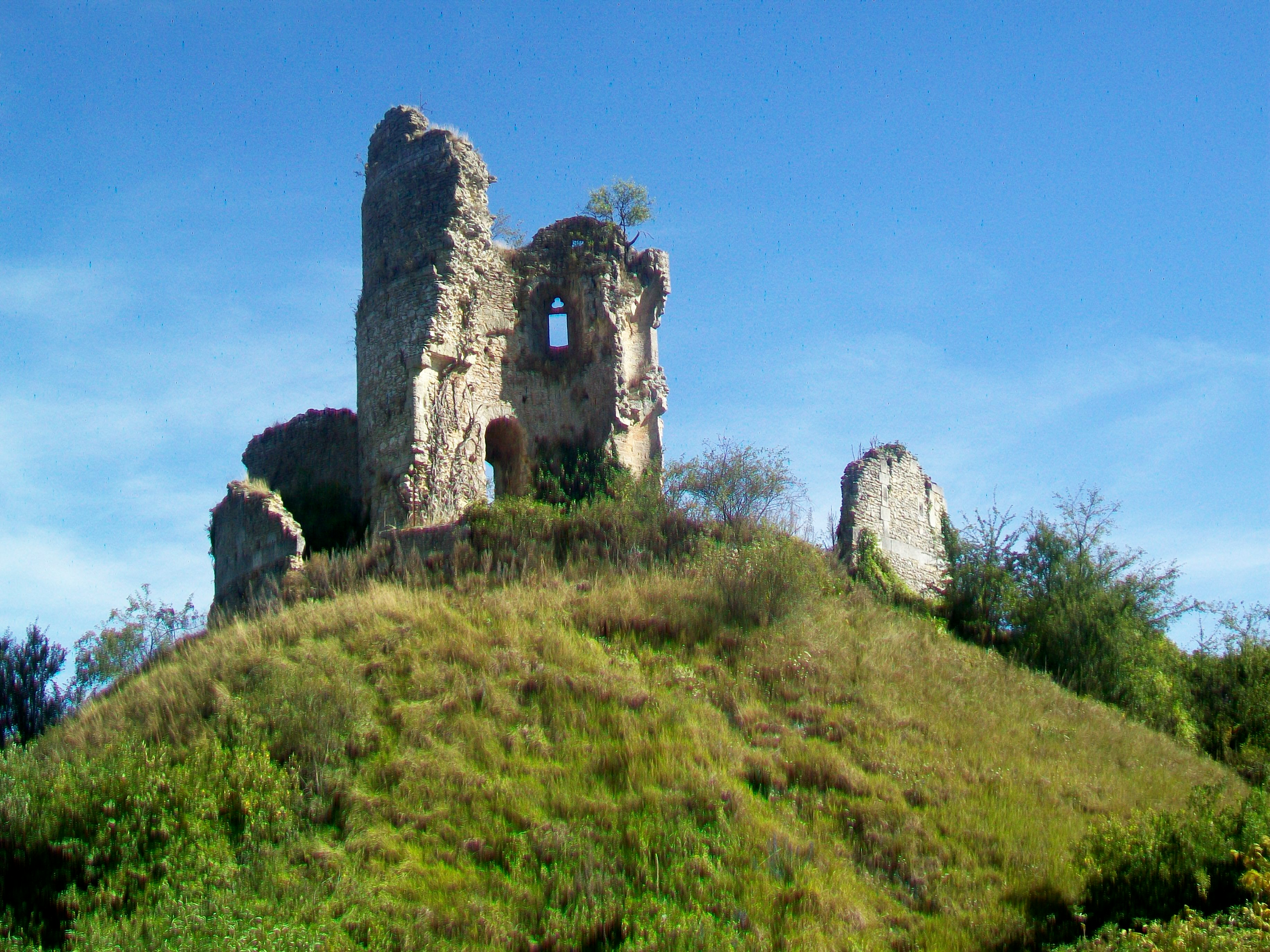 Vue du donjon depuis le sud.